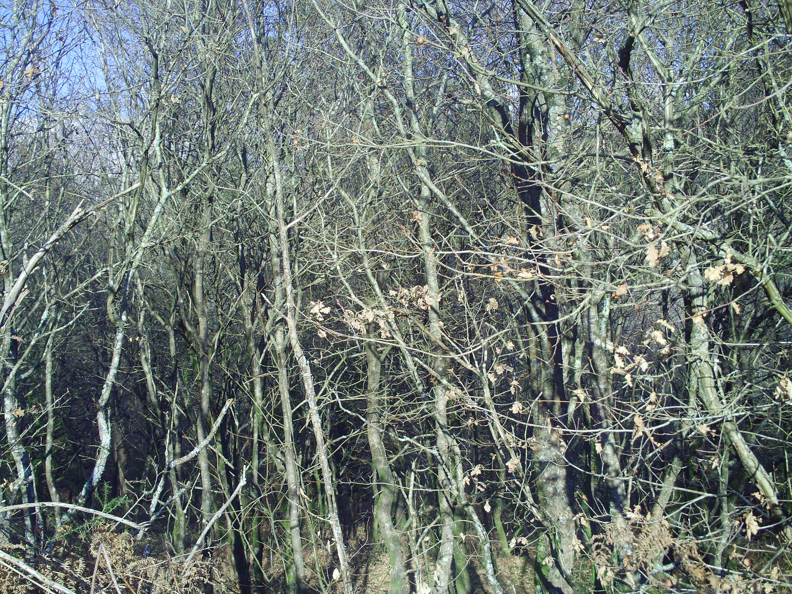 Angrois, bosque autóctono